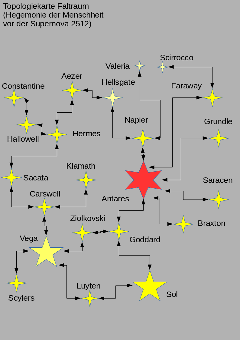 Eine Faltraumkarte aus Der Antares-Krieg